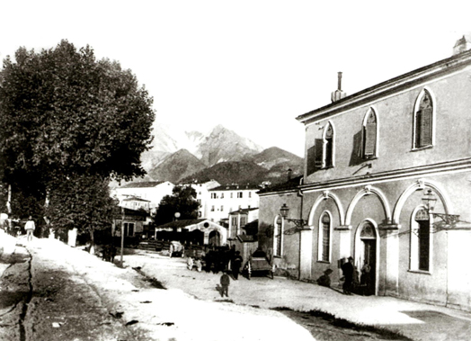 Cartolina storica della stazione di Carrara San Martino nell'ottocento (altra versione).